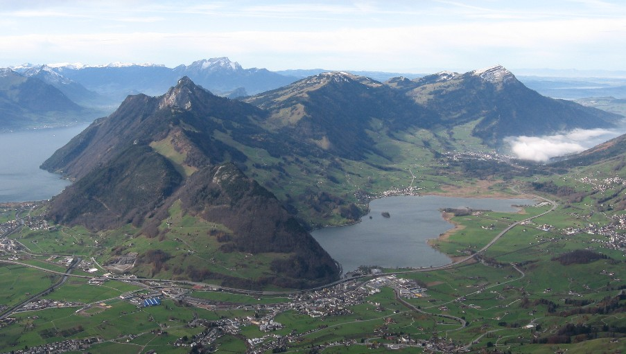 Rigi vom Mythen; links Vierwaldstättersee, vorne Lauerzersee und unter dem Nebel bei Arth folgt der Zugersee. Rigi Kulm ganz rechts mit etwas Schnee bedeckt.